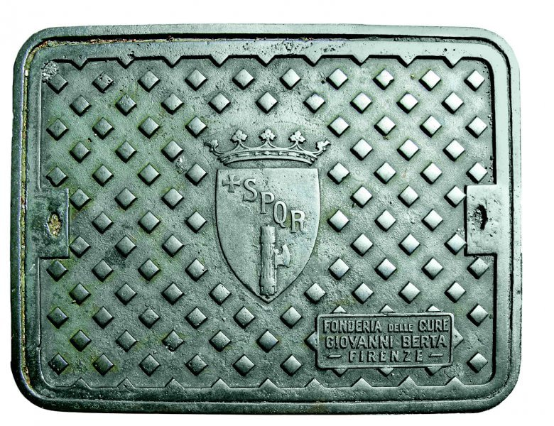 Lo stemma di Roma su un tombino come appariva durante il fascismo